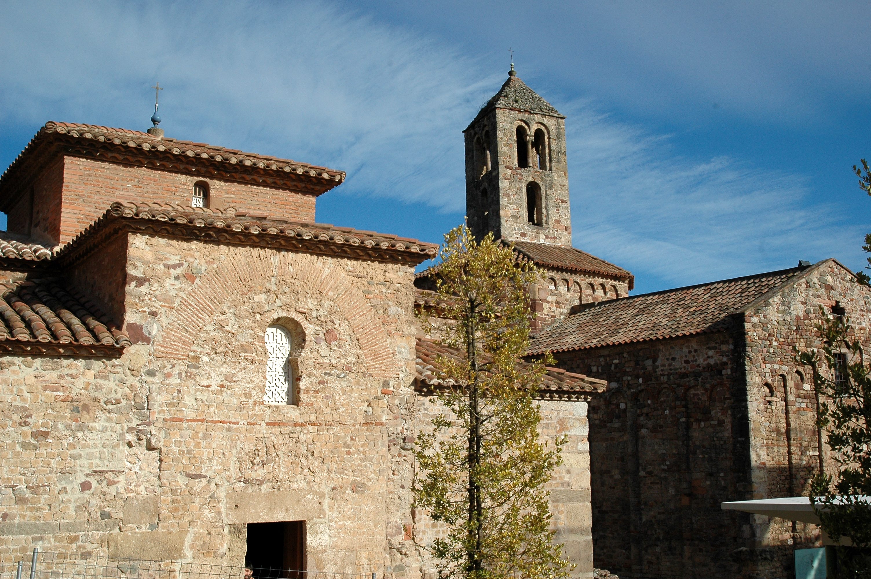 Església de Sant Miquel (Terrassa)